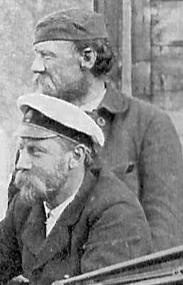 Василий Константинович Константинов и Сергей Карлович Старк. Согласно воспоминаниям Штейпа, в белой фуражке Старк, а Константинов стоит за ним. Согласно же информации Музея истории города-курорта Сочи, Штейп ошибся - в белой фуражке путейца Константинов, а Старк стоит за ним.